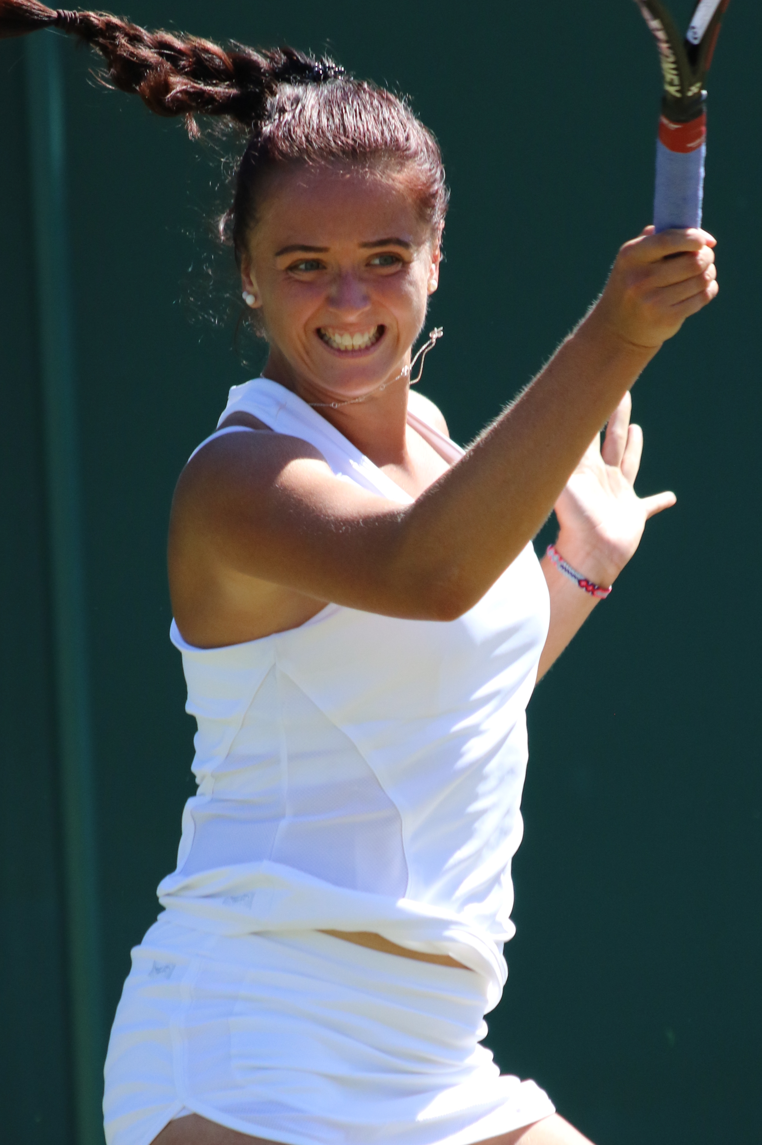 Kuzmova WM18 (19)